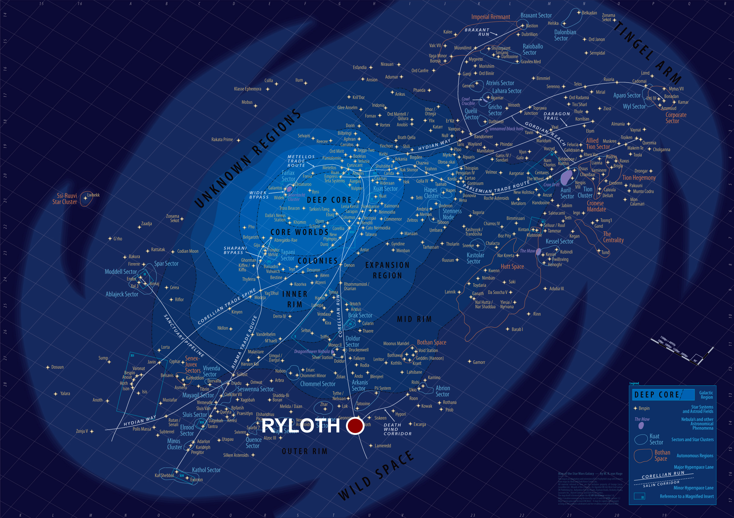 Localisation de Ryloth sur la carte Star Wars